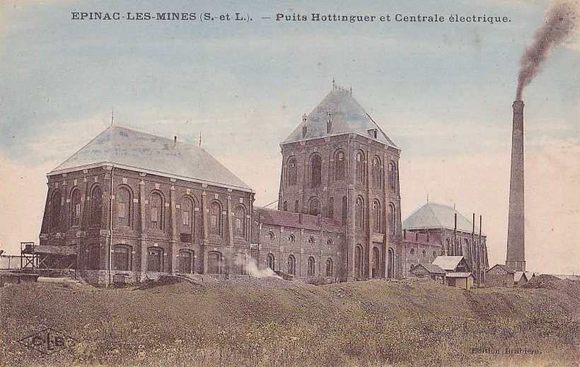 Le puits Hottinger (Houillères d’Épinac, France).